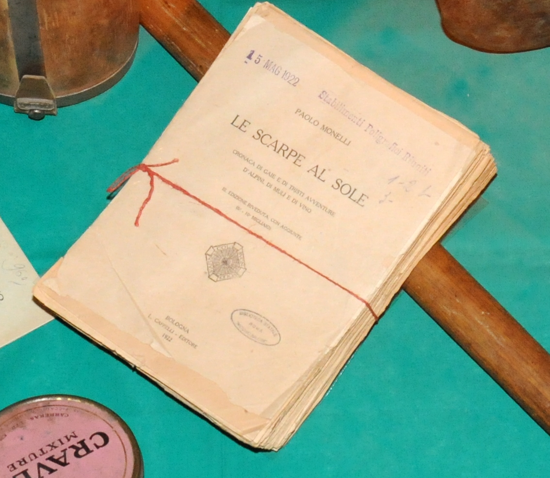 Particolare della vetrina della Mostra permanente della Grande Guerra sito in Borgo Valsugana (TN): copia de "le scarpe al sole" con note autografe di Paolo Monelli, proveniente dalla Biblioteca statale Antonio Baldini di Roma